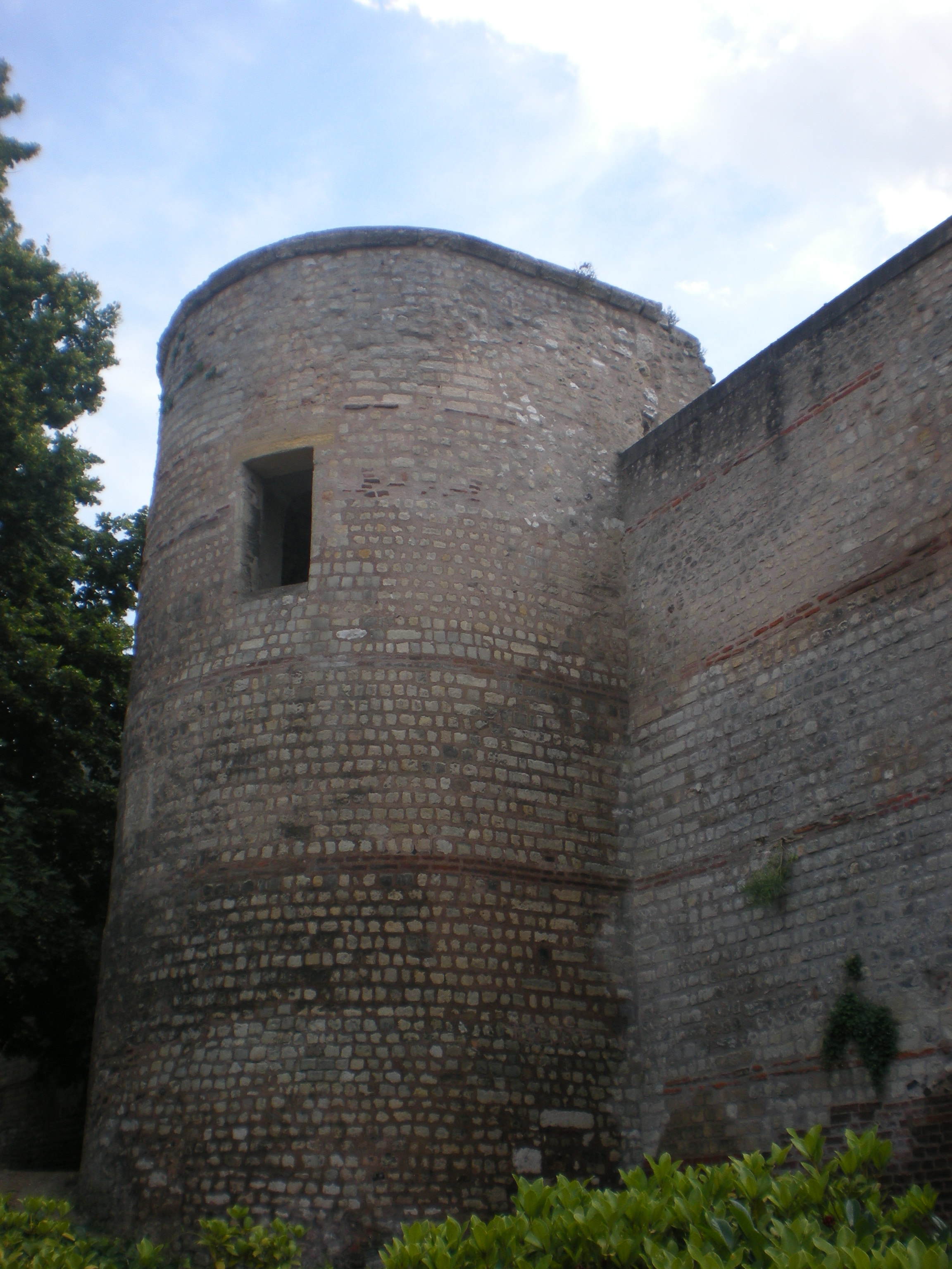 les remparts gallo-romains de beauvais (oise)